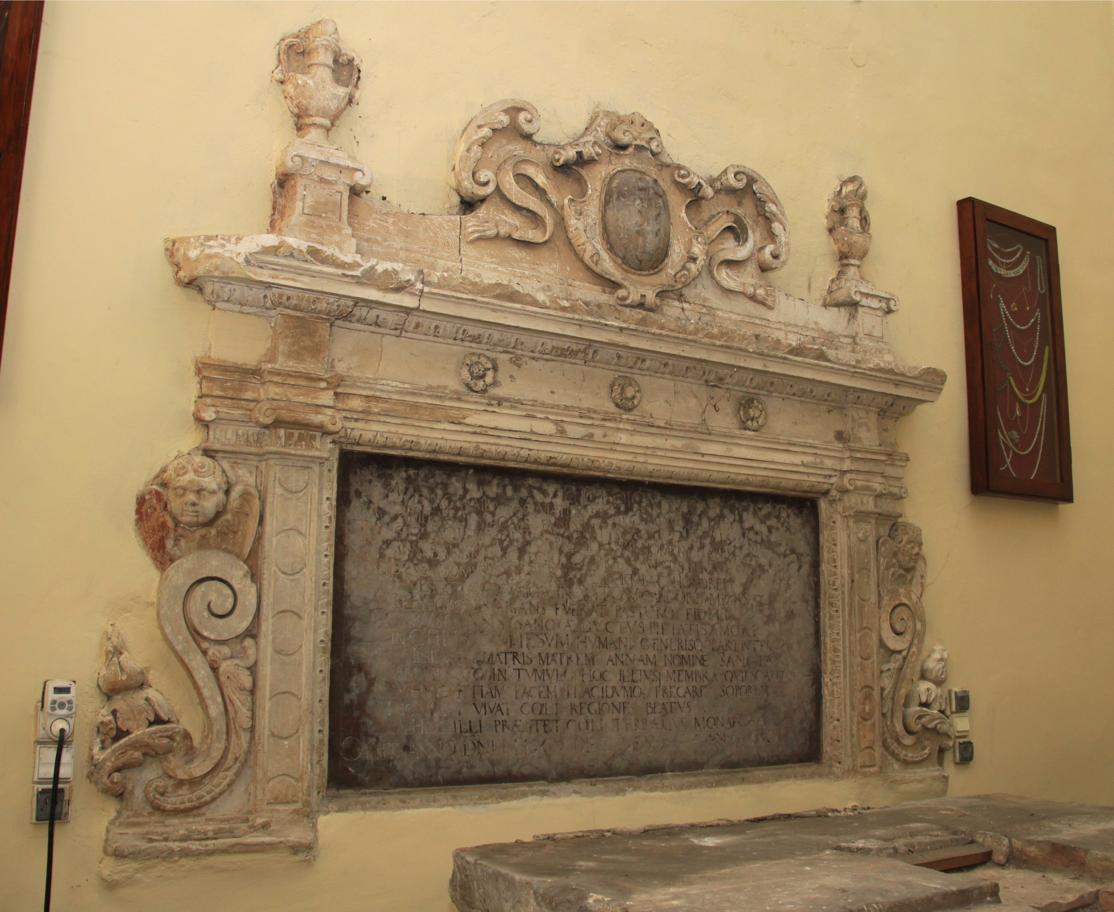 Tablica fundacyjna Zygmunta Urbańskiego w kaplicy Matki Boskiej (pierwotnie św.Anny) w kościele NPNMP w Busku-Zdroju